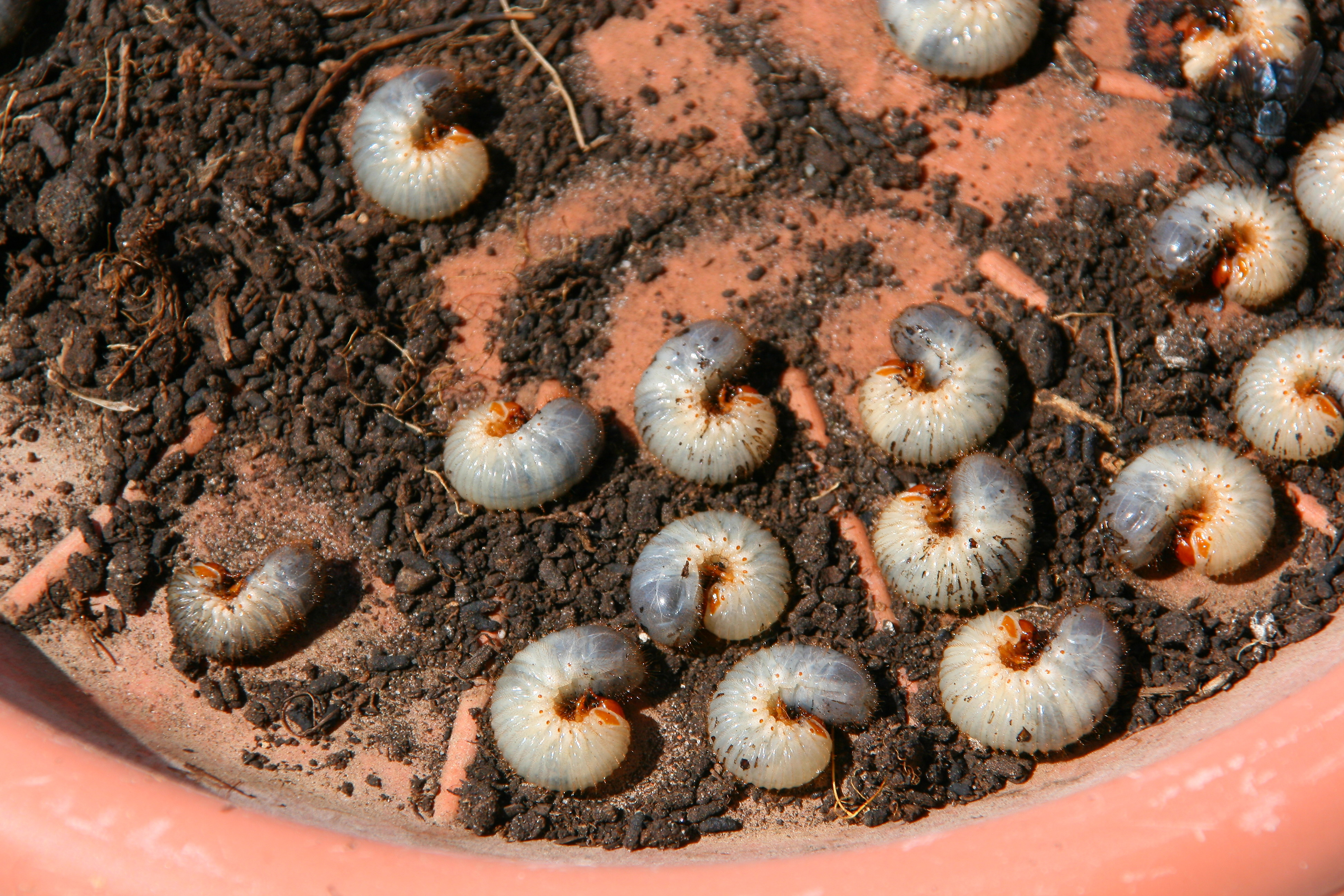 Unbekannte Würmer/Maden/kA N/A